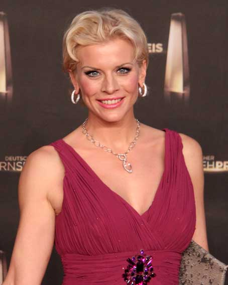 Eva Habermann beim Deutschen Fernsehpreis 2012